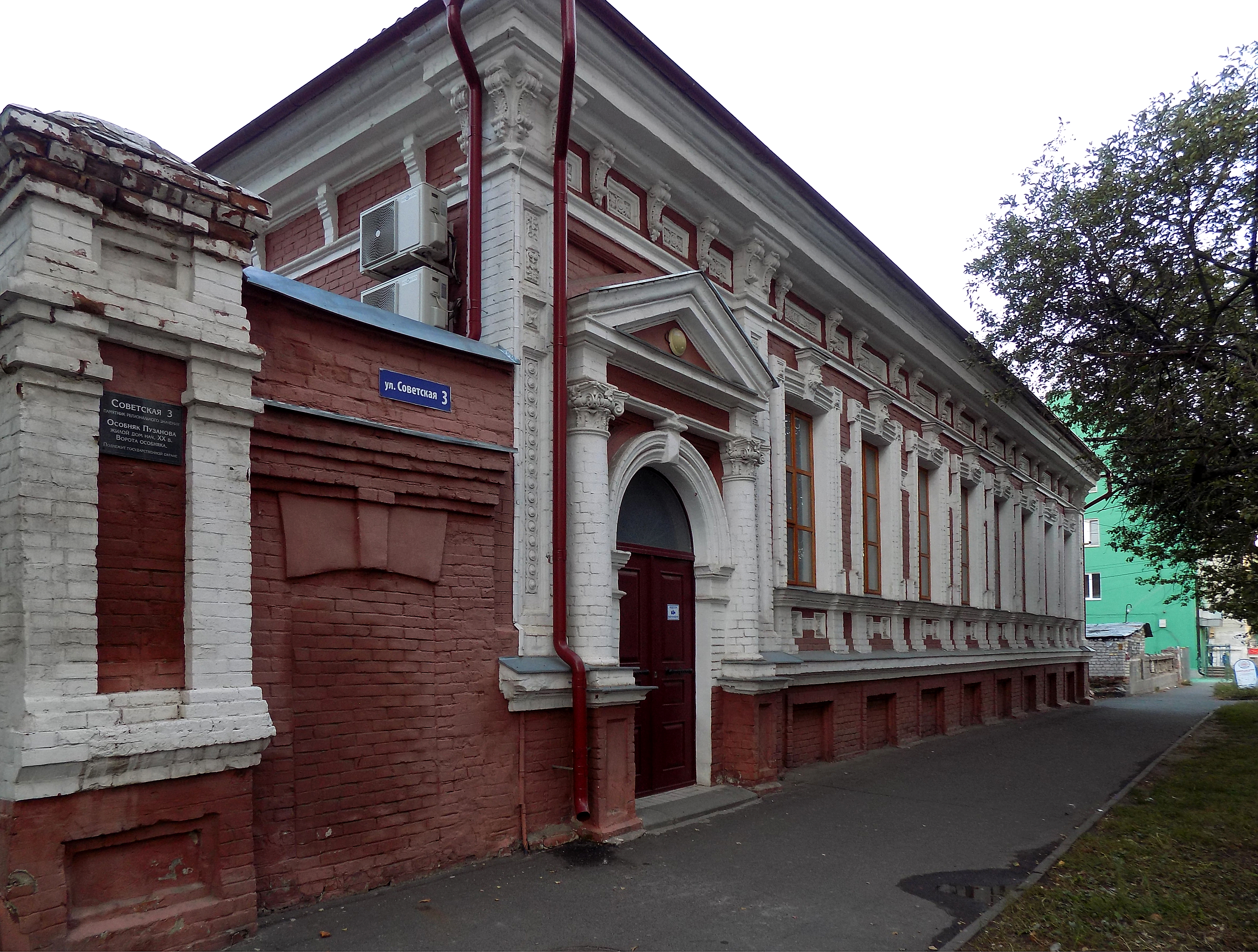 Особняк Пузанова: улица Советская, 3, Курск, Курская область